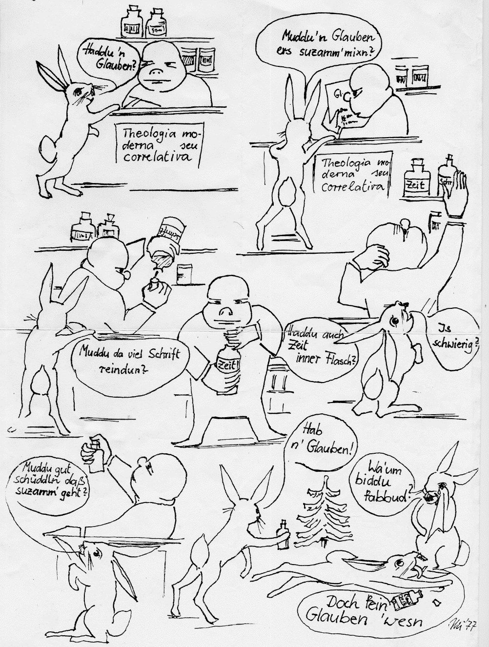 Zeichnung von Friedrich Mildenberger zur Illustration eines dogmatischen Sachverhalts (fides qua creditur)